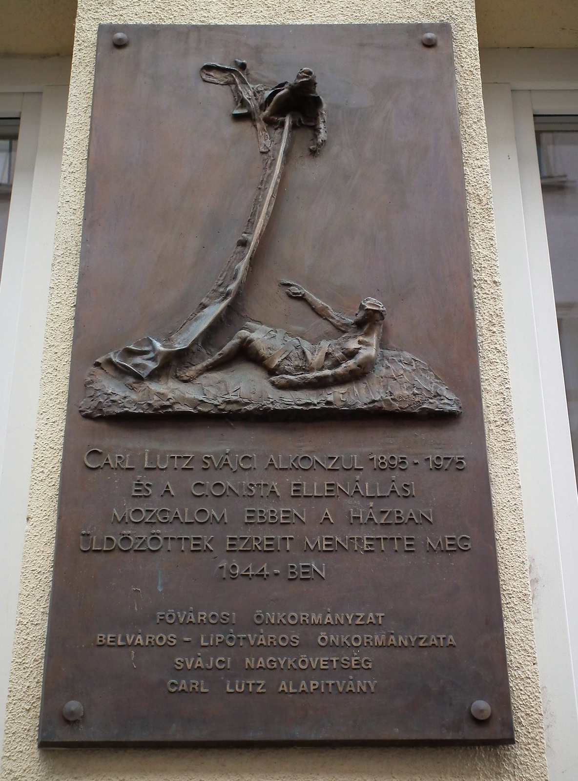 Lakó- és irodaház, az ún. "Üvegház" (Budapest 5, Vadász utca 29.) This is a photo of a monument in Hungary, Identifier: 12313